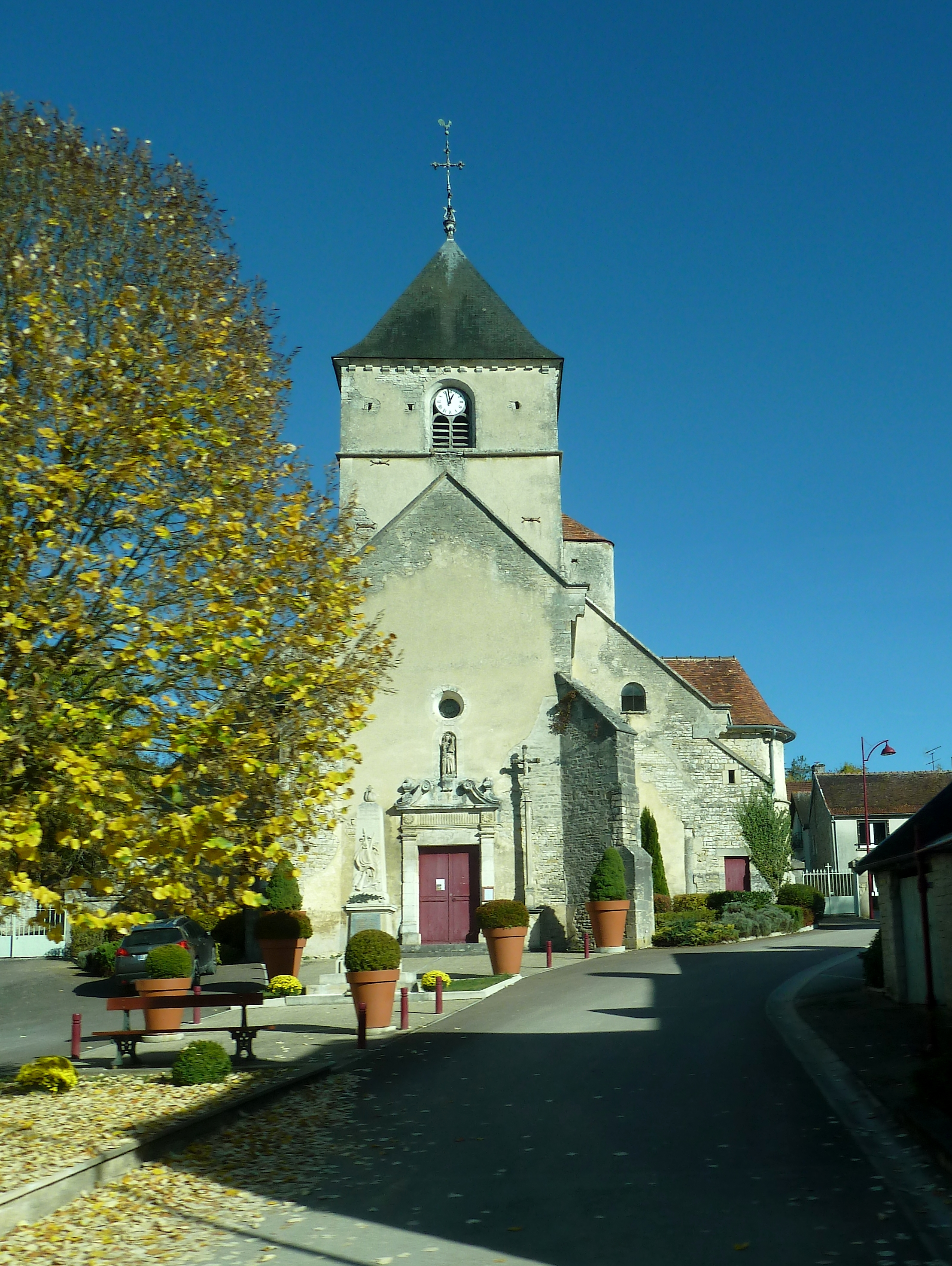 Courteron - Place de l'église - Aube France